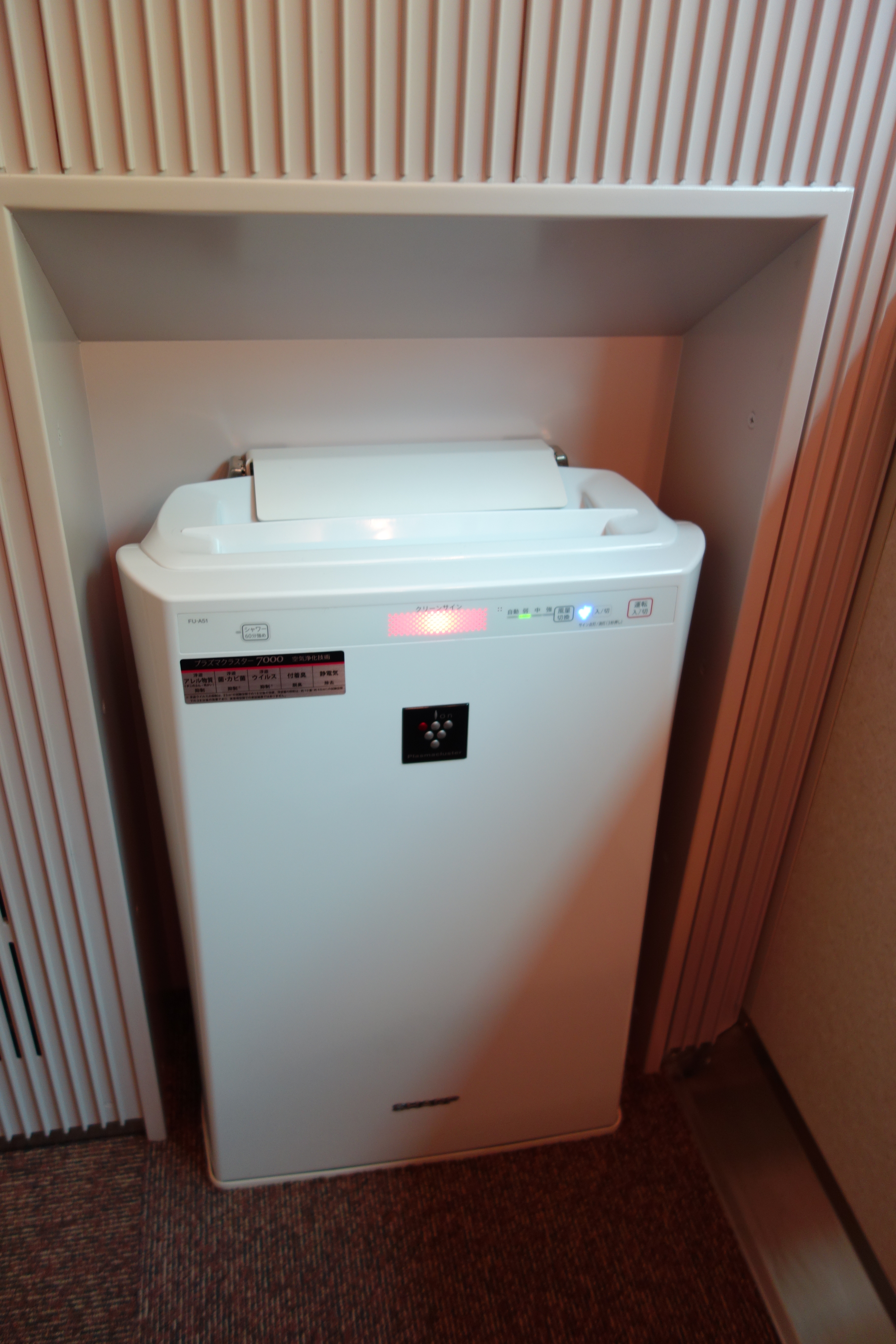 しまかぜ カフェ車両（1階） シャープ空気清浄機「FU-A51」